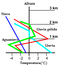 Distintas temperaturas para formar la precipitación